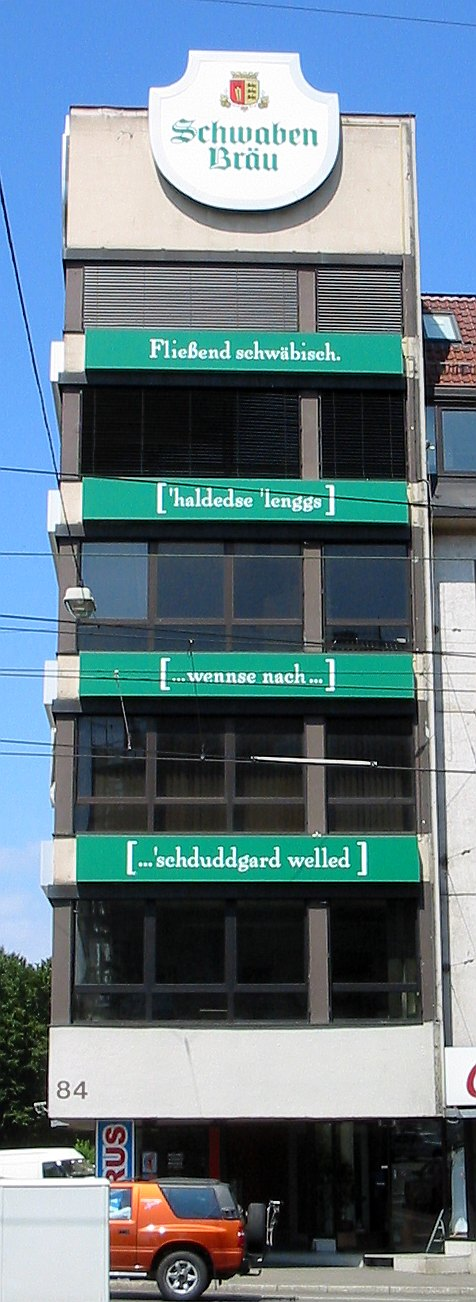 Schwabenbräu-Werbung an einer Hausfassade in Stuttgart-Bad Cannstatt eigenes Foto / alle Rechte freigegeben